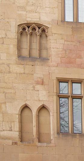 Vermauerte Fenster in der seitlichen Fassade des Rathauses in Heilbronn